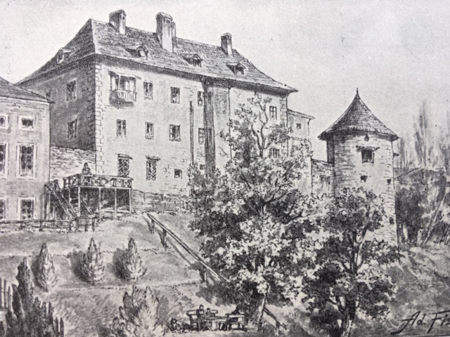 gezeichnet von Ad. Fischer 1897, entnommen aus: Krackowizer, Band 1, aaO. S. 212